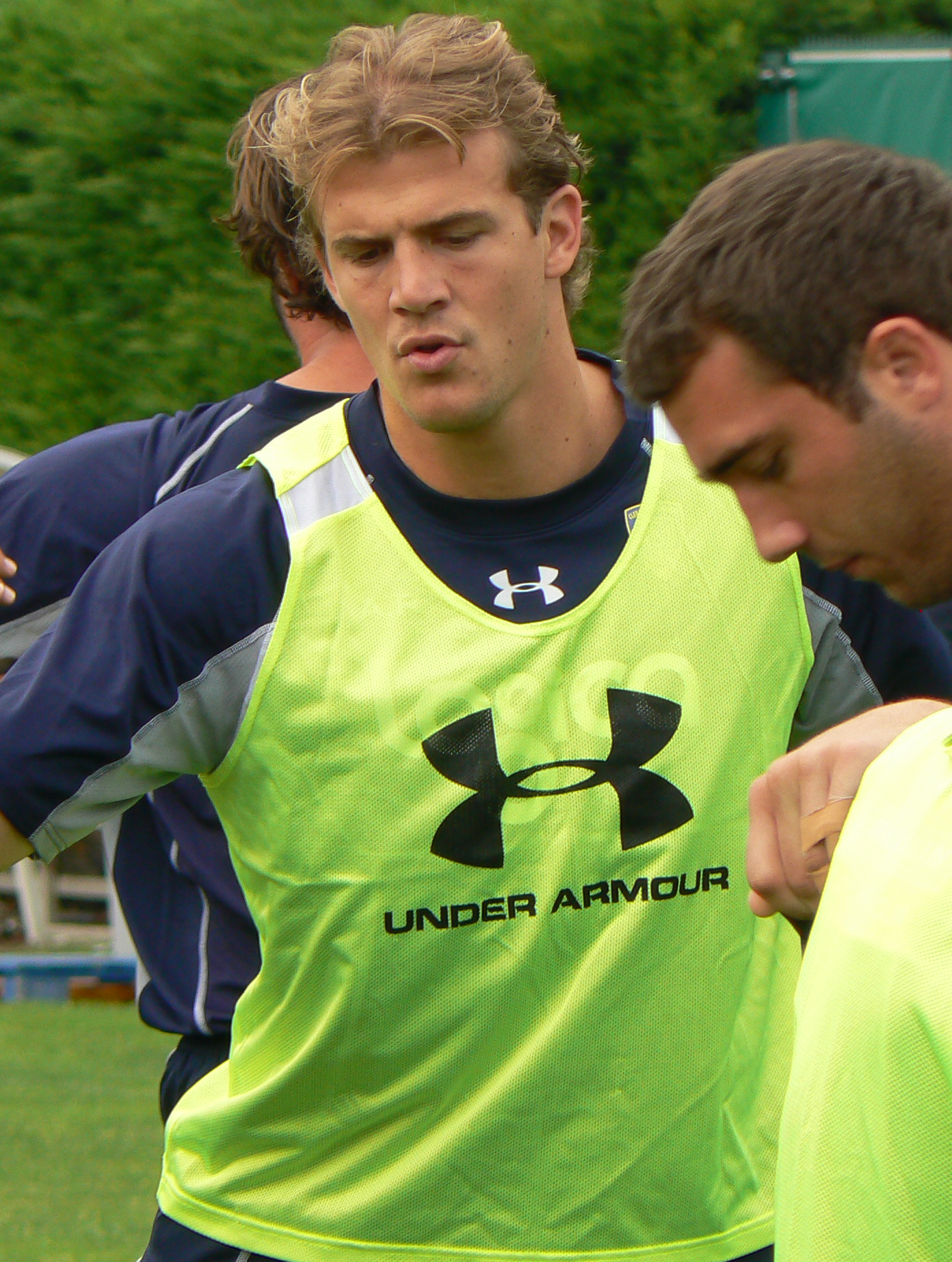 Le rugbyman français Aurélien Rougerie lors d'un entraînement avec l'ASM Clermont Auvergne.